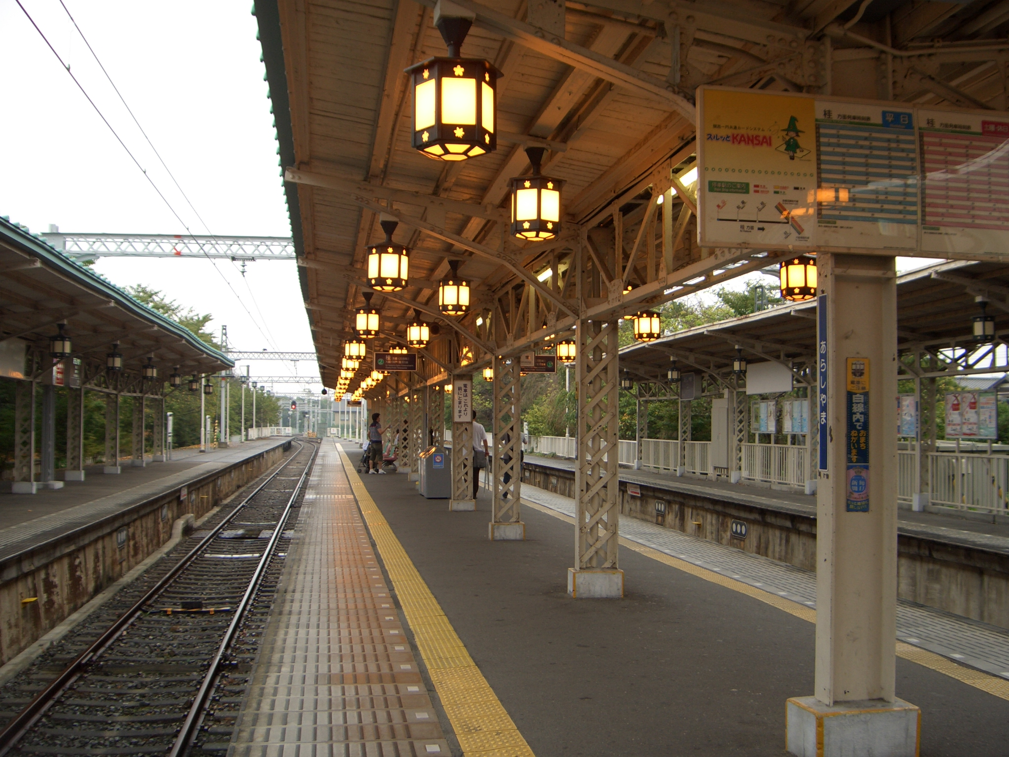 阪急電鉄嵐山線嵐山駅の構内